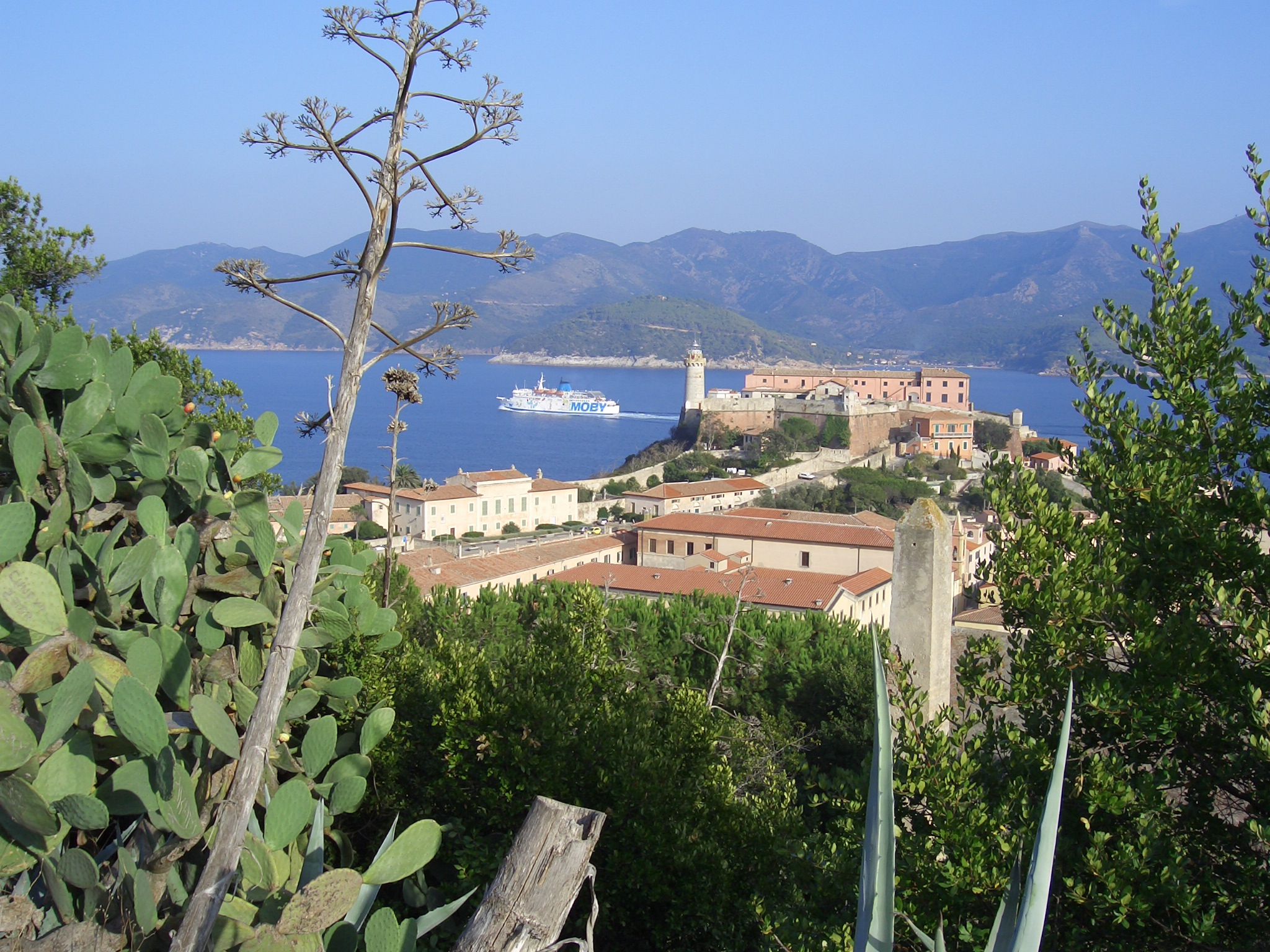 Isola d'Elba; Elba, Portoferraio